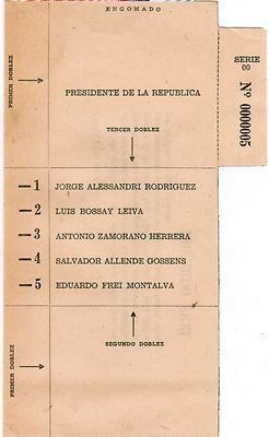 Facsimil del voto de la Elección presidencial de Chile de 1958, que fue usado como elemento de campaña de la candidatura de Eduardo Frei. El voto usado en la elección no presentaba líneas ni marcas que indicaran los dobleces.